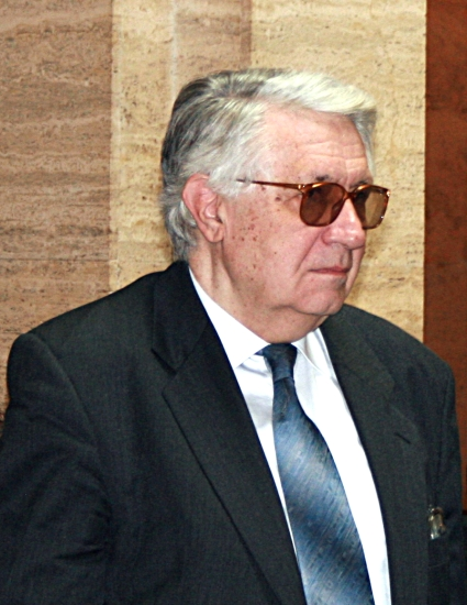 Svečano proglašenje i predstavljanje novih članova Hrvatske akademije znanosti i umjetnosti u Zagrebu